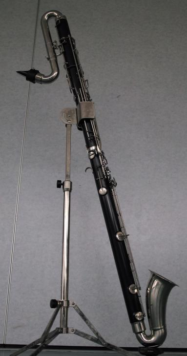 Photographie de profil d'une clarinette contralto